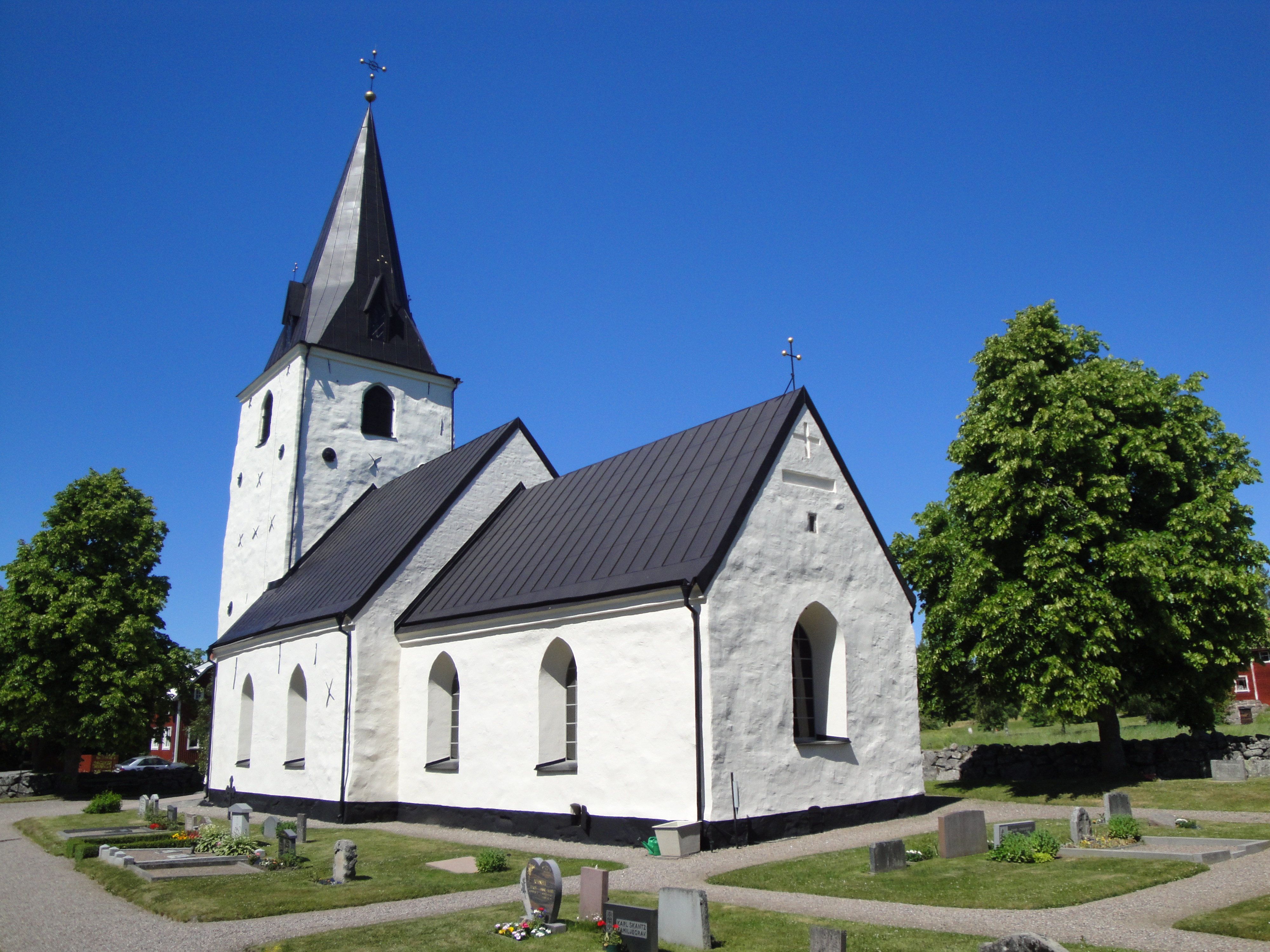 Gottröra kyrka, Norrtälje kommun.